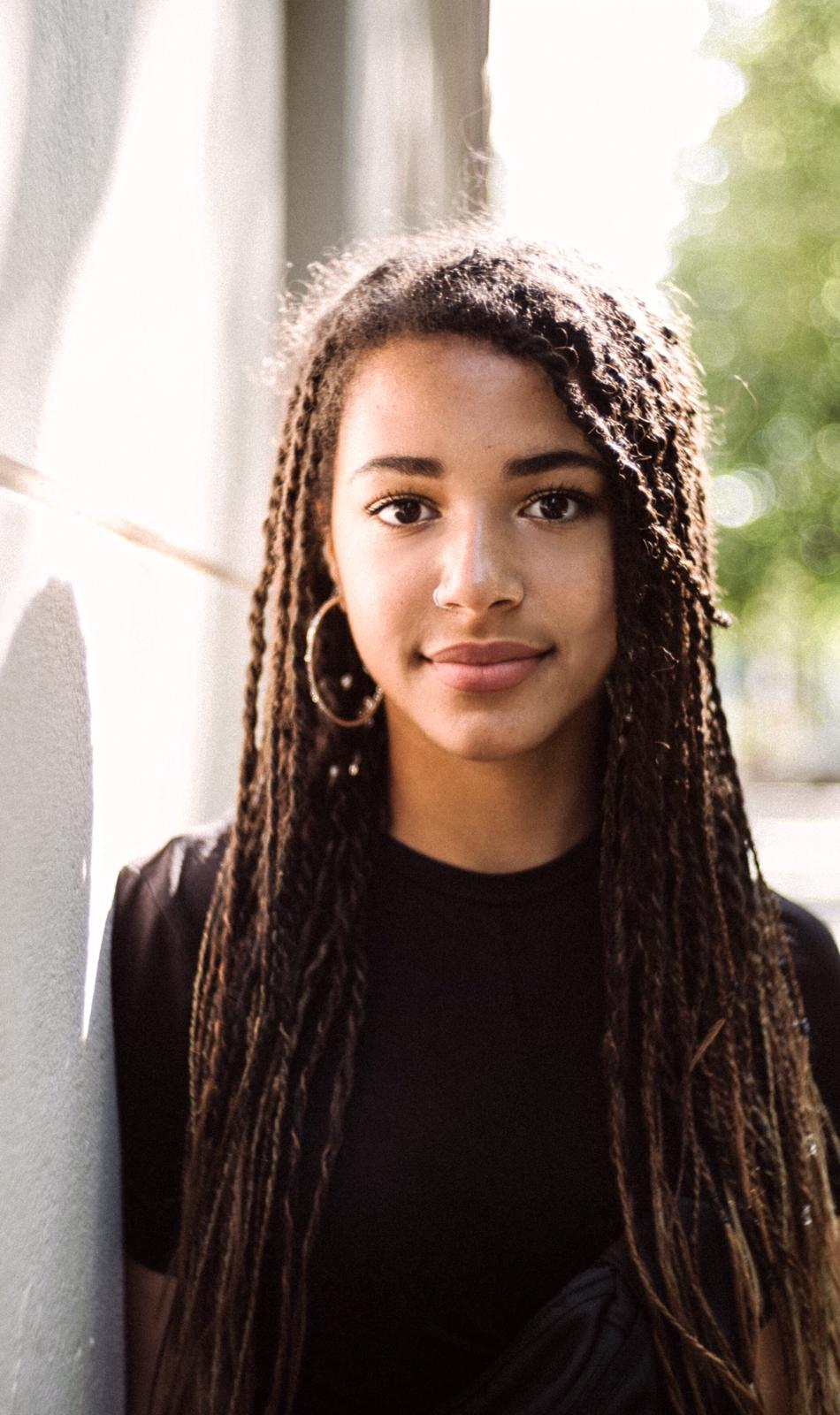 Luna Baptiste Schaller 2019 Portrait, Photo by Alex Kleis [CC BY 2.0]